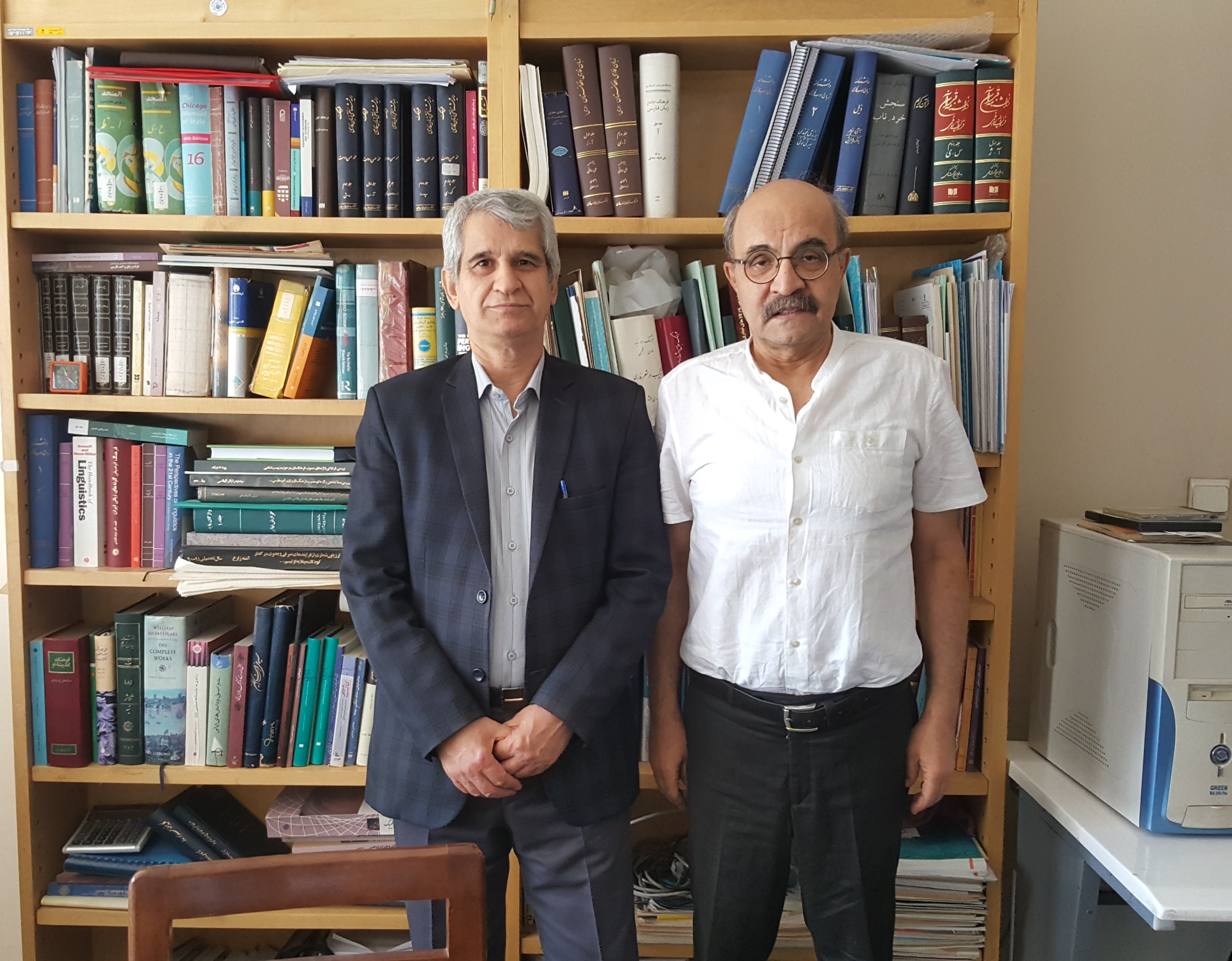 علاءالدین طباطبایی و علی کافی در فرهنگستان زبان و ادب فارسی، اردیبهشت هزار و سیصد و نود و هشت ـ الف